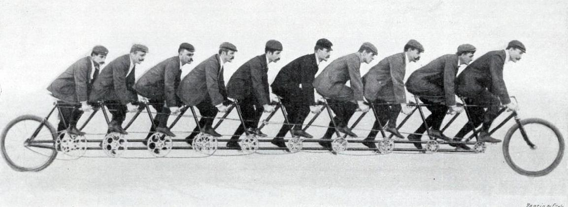 Une décuplette de démonstration (Londres, 1897).